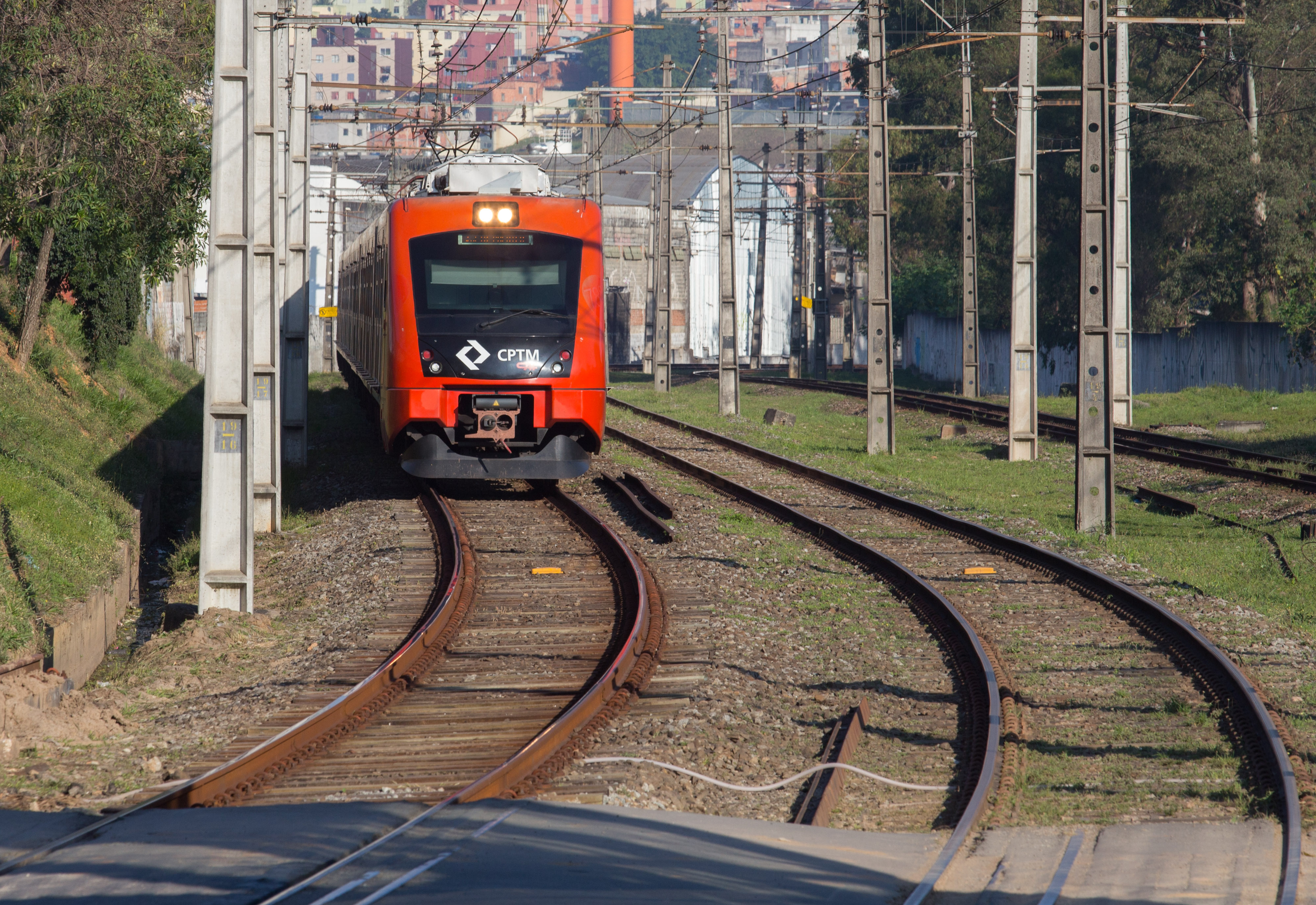 O Governador Geraldo Alckmin, participa da entrega da Estação Quitaúna Osasco - Linha 8 CPTM.DATA 26/06/2017. LOCAL: Osasco/SP. FOTO: Diogo Moreira